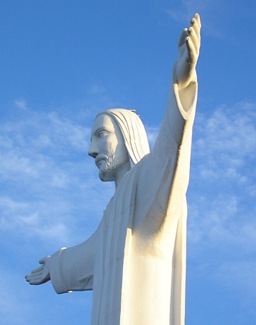 Cristo de las Noas en la Comarca Lagunera, ubicada en el centro-norte de México.